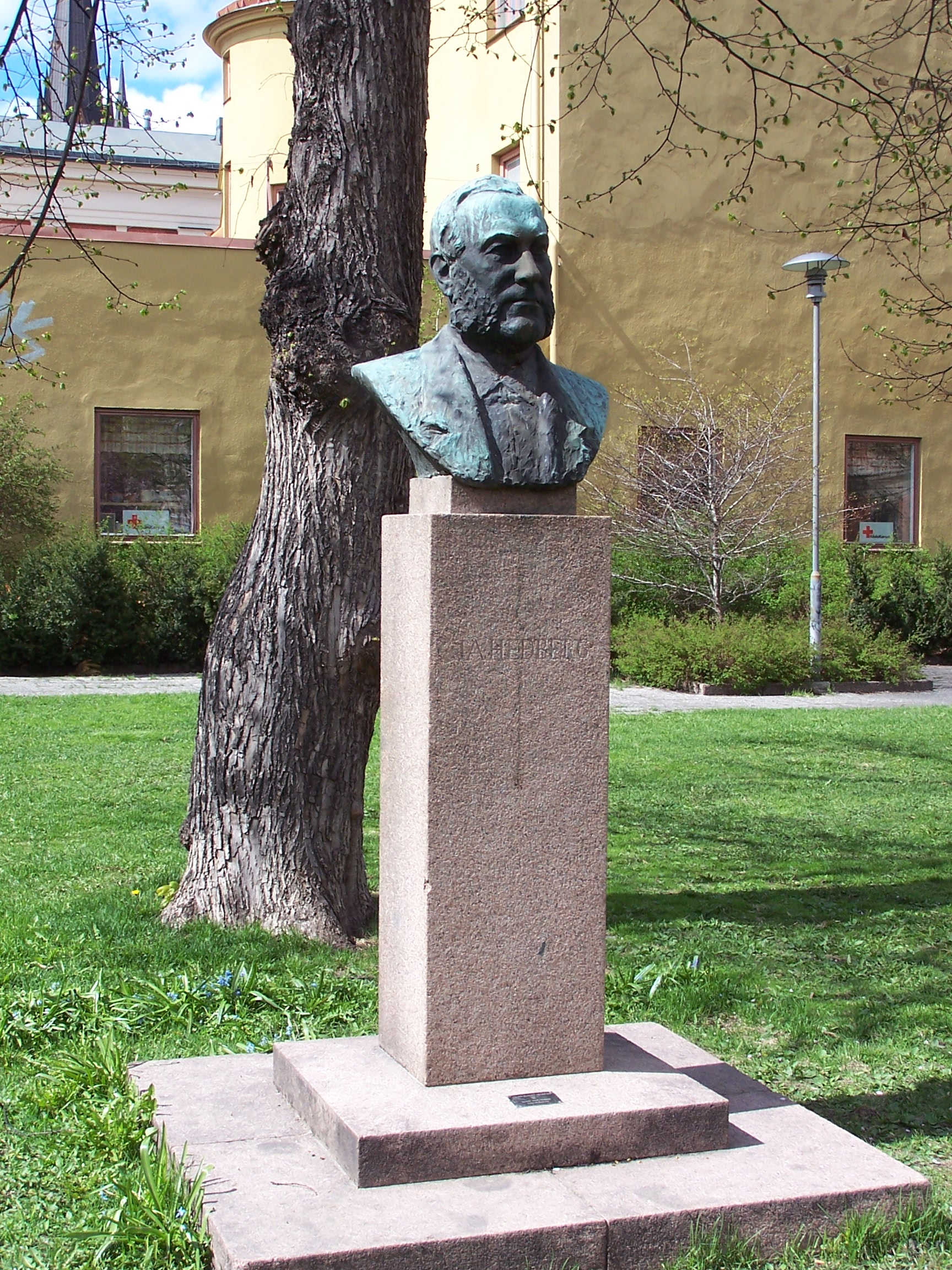 J A Hedberg by Gustav Adolf Hedblom in Hedbergska parken, Sundsvall